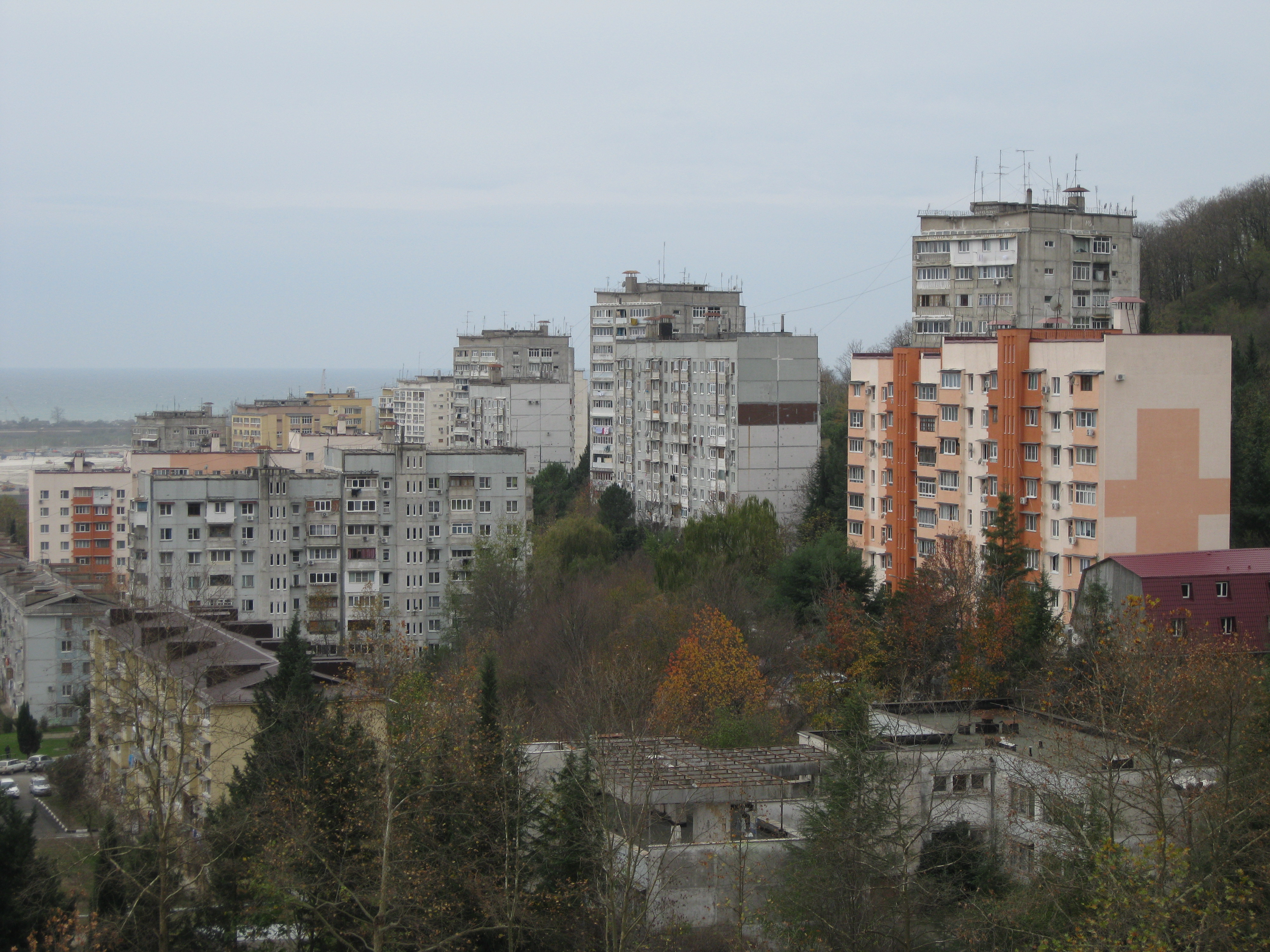 Адлер, Блиново